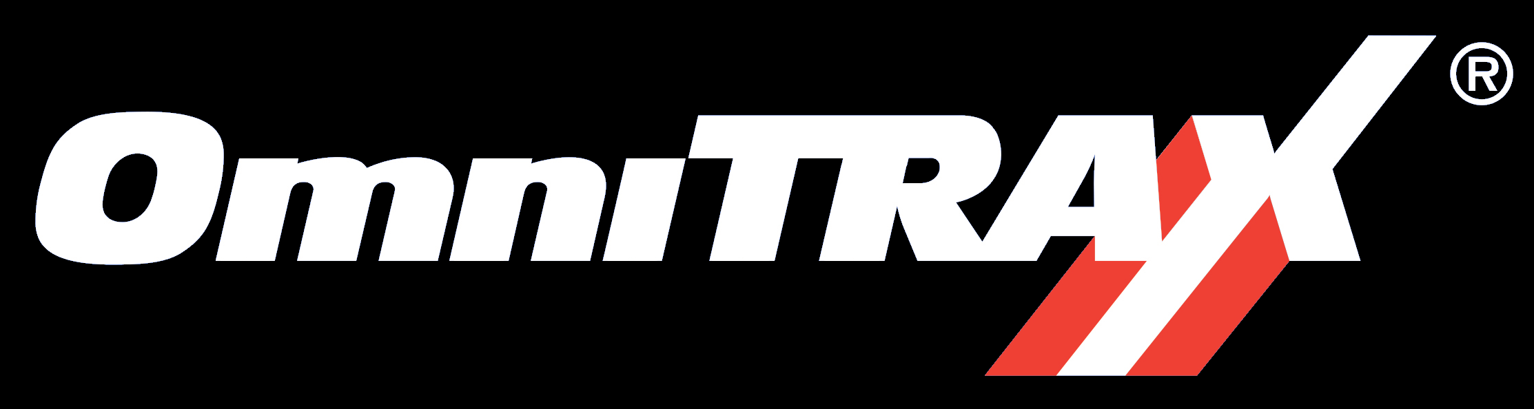 Logo von Omnitrax